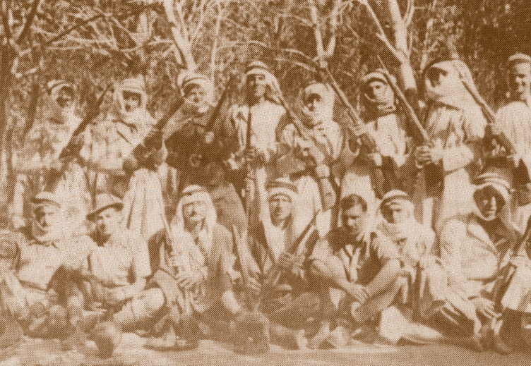 המחלקה הערבית של הפלמח השחר 1948 ארכיון ההגנה